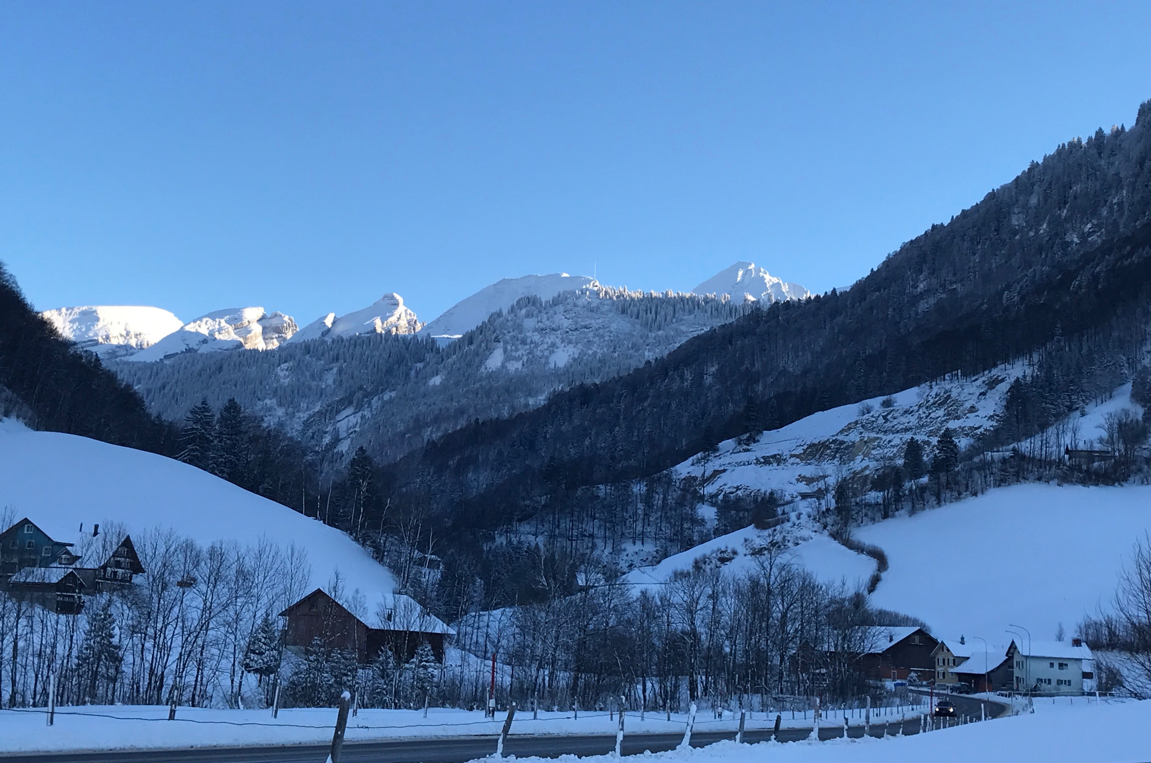 Blick auf die Churfirsten von Norden: Hinderrugg, Brisi, Frümsel, Selun sowie der Schären